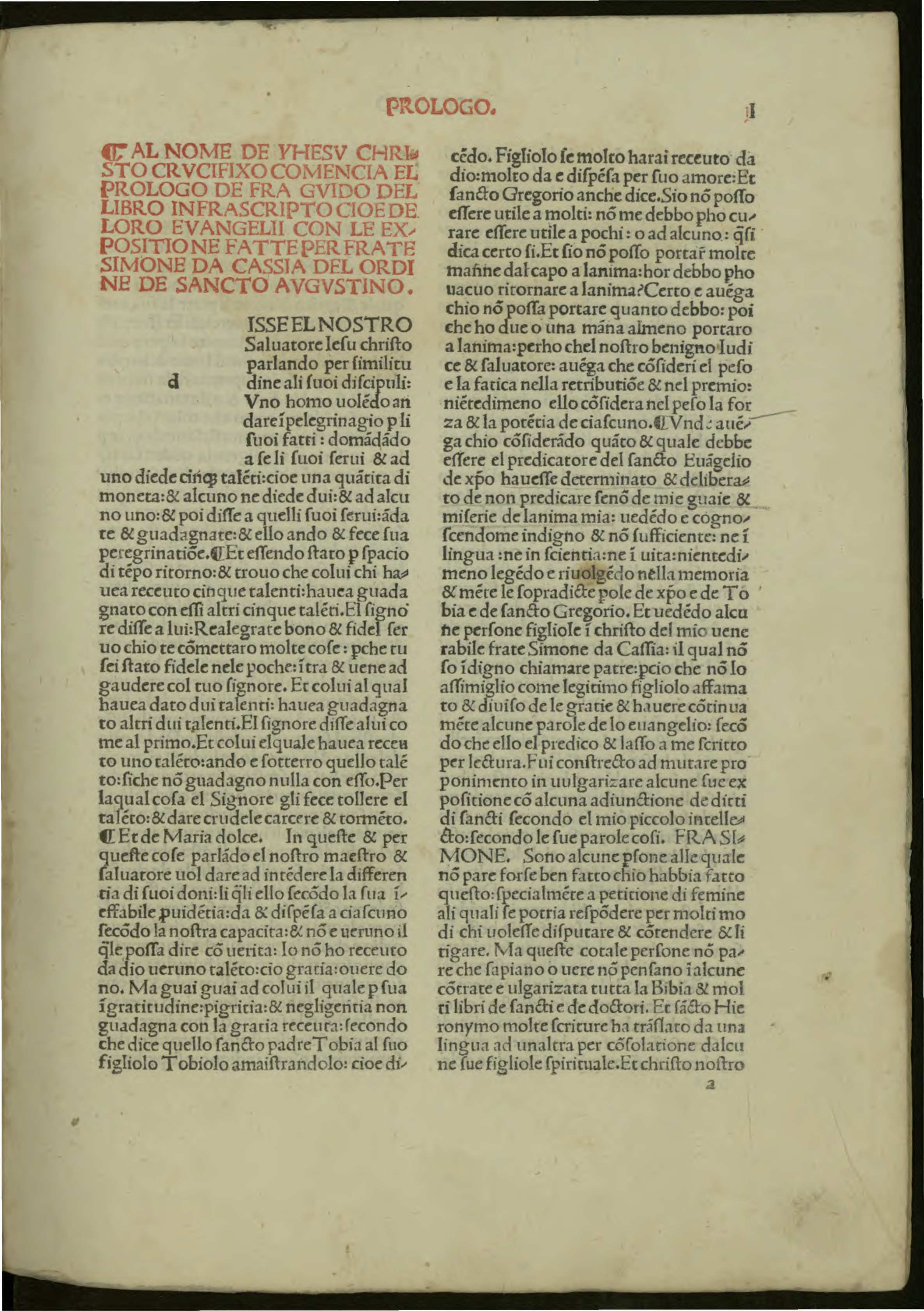 Expositio super totum corpus Evangeliorum (italiano). - Impresso in Venetia : per Hannibal da Foxo da Parma , nello anno del MCCCCLXXXVI adi penultimo de decembrio. - 156 c. ; [*]⁴, a-t⁸ ; fol. - Il titolo dell'opera è De gestis Domini Salvatoris, ma nella tradizione manoscritta il testo è molto spesso intitolato Liber o Expositio super totum corpus Evangeliorum. Volgarizzato dopo la morte dell'autore, con modifiche e adattamenti, dall'allievo Giovanni di Salerno, ebbe larga fortuna. - E. Menestò, Simone Fidati, in DBI 47 (1997) .